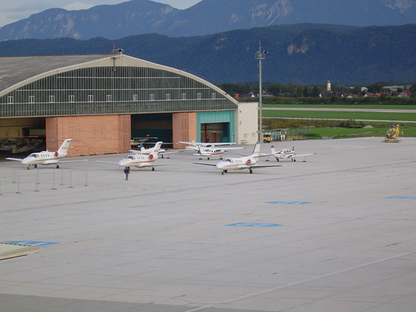 General Aviation-Bereich